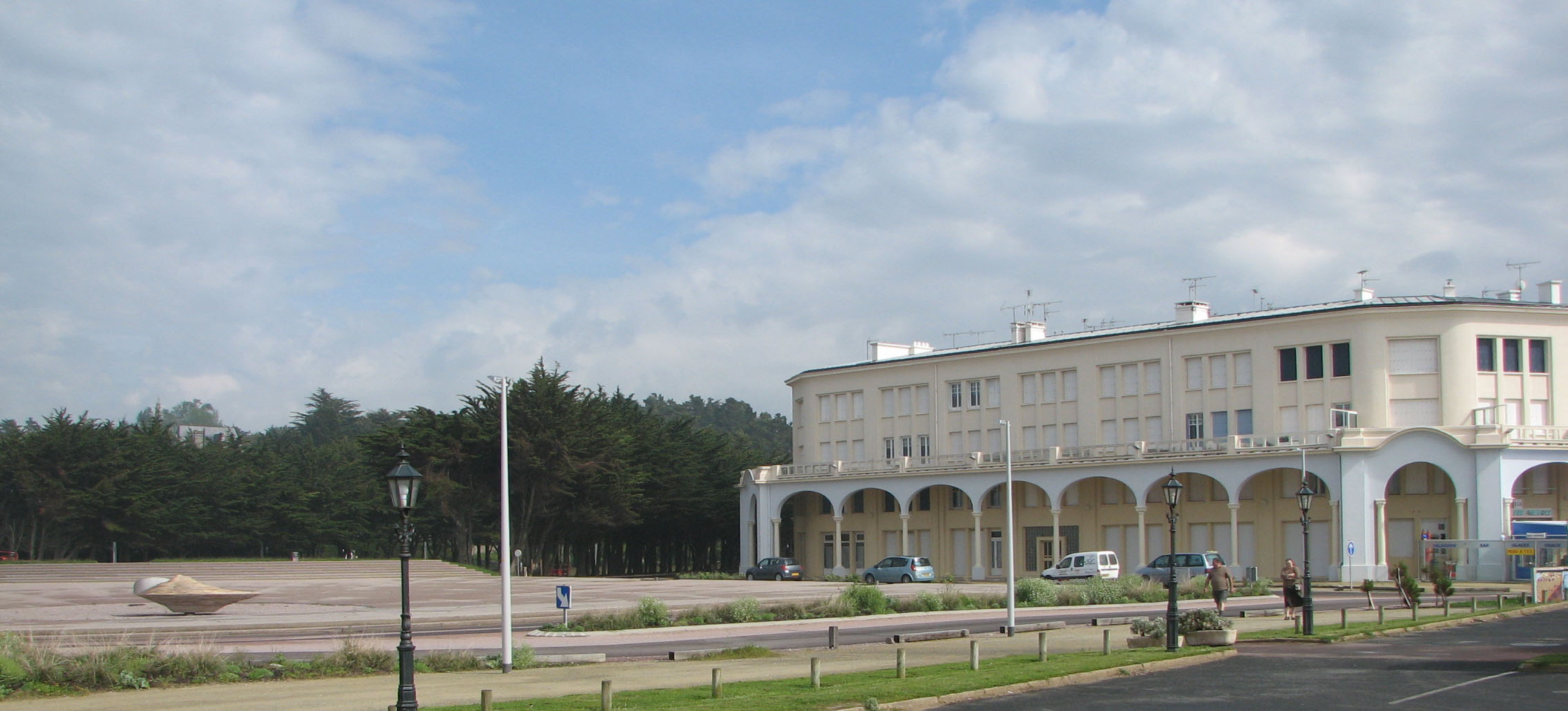 Place et bâtiment aux Sables-d'Or-les-Pins